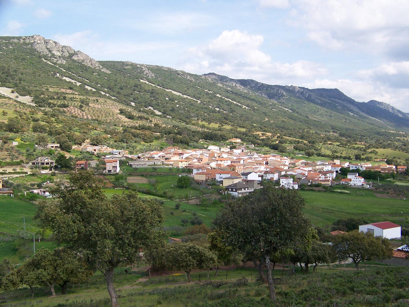 Vistas desde el cerro del Malagón